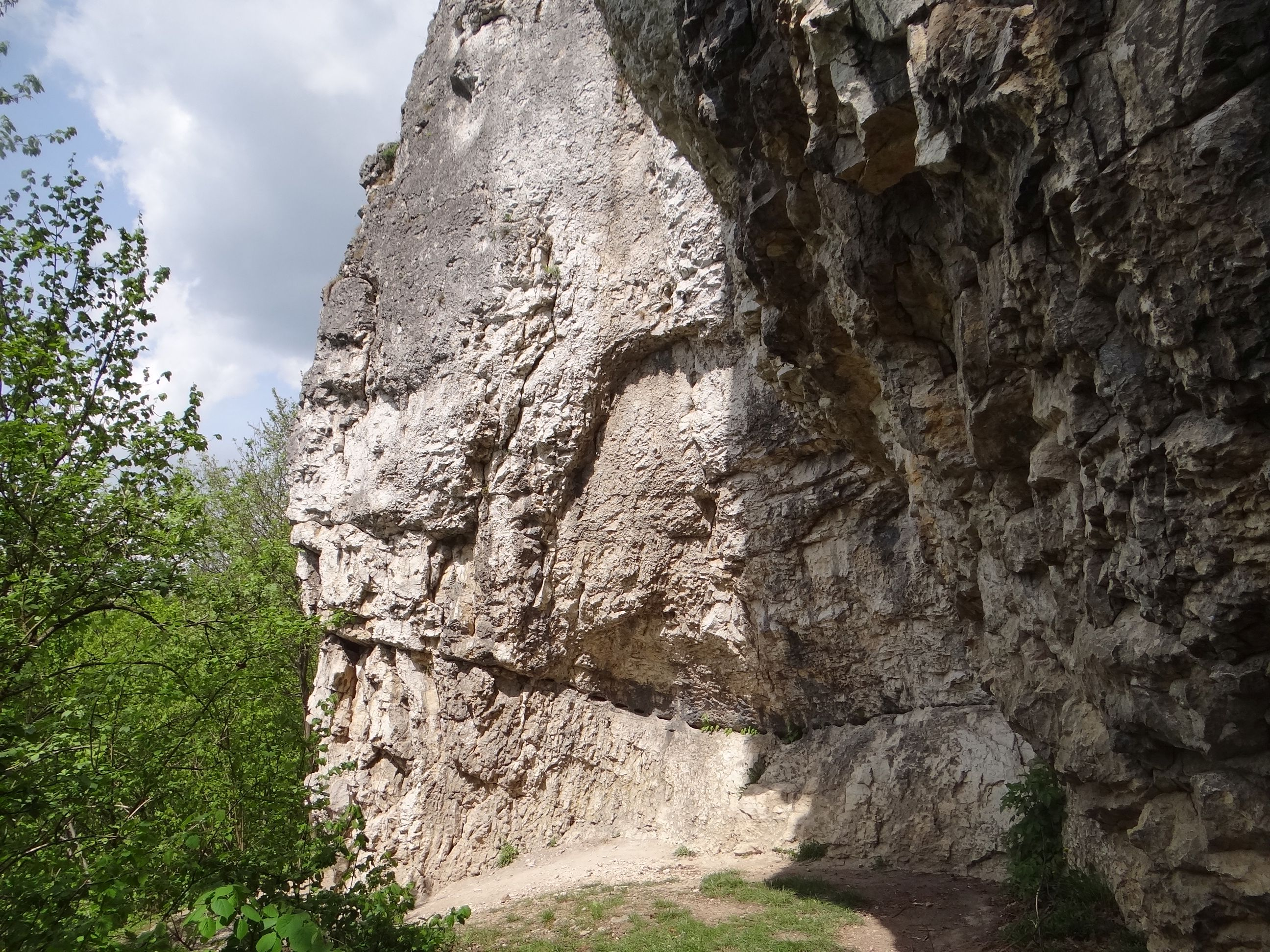 Skały Lotniki w Dolinie Kobylańskiej